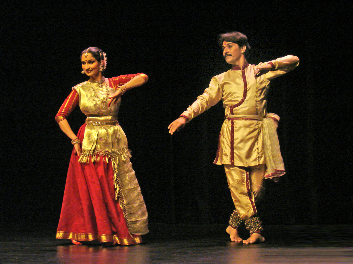 Danse Kathak, Sharmila Sharma et Rajendra Kumar Gangani et leurs musiciens samedi 24 Novembre 2007 au musée Guimet (Paris)